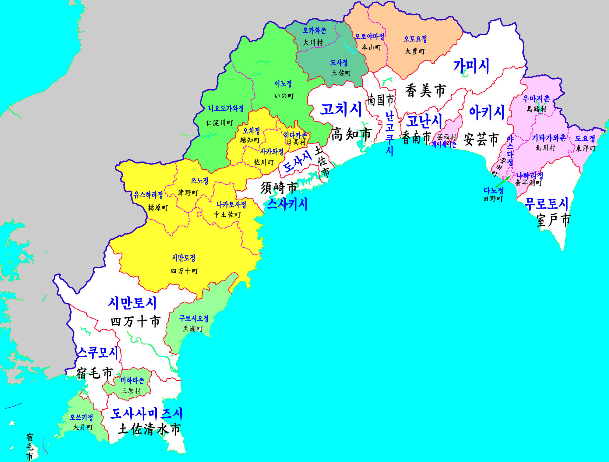 고치현 행정구역